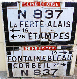 Plaque Michelin N837 de 1934 à Milly-la-Foret (Essonne)